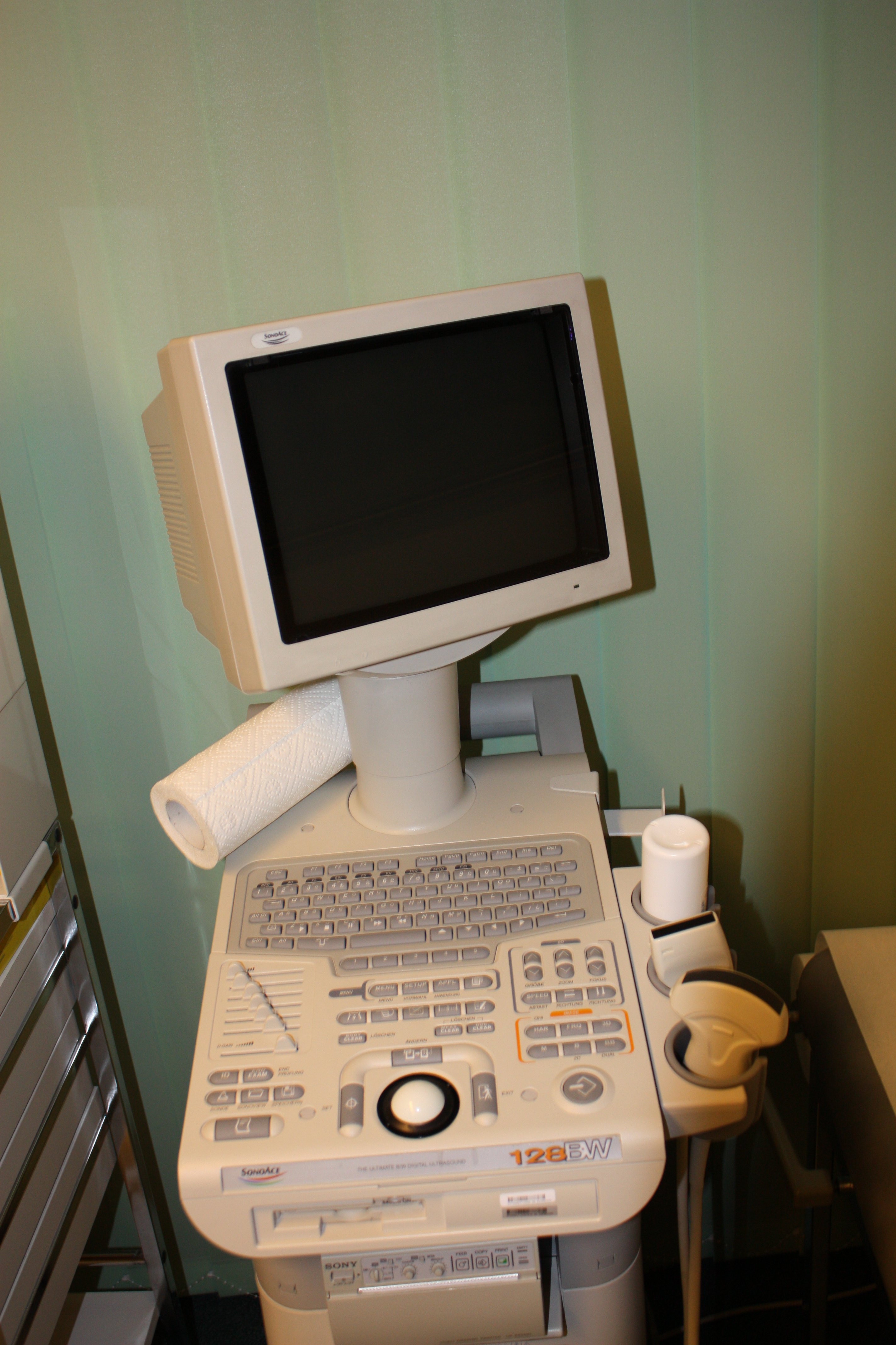 Ultraschallgrät